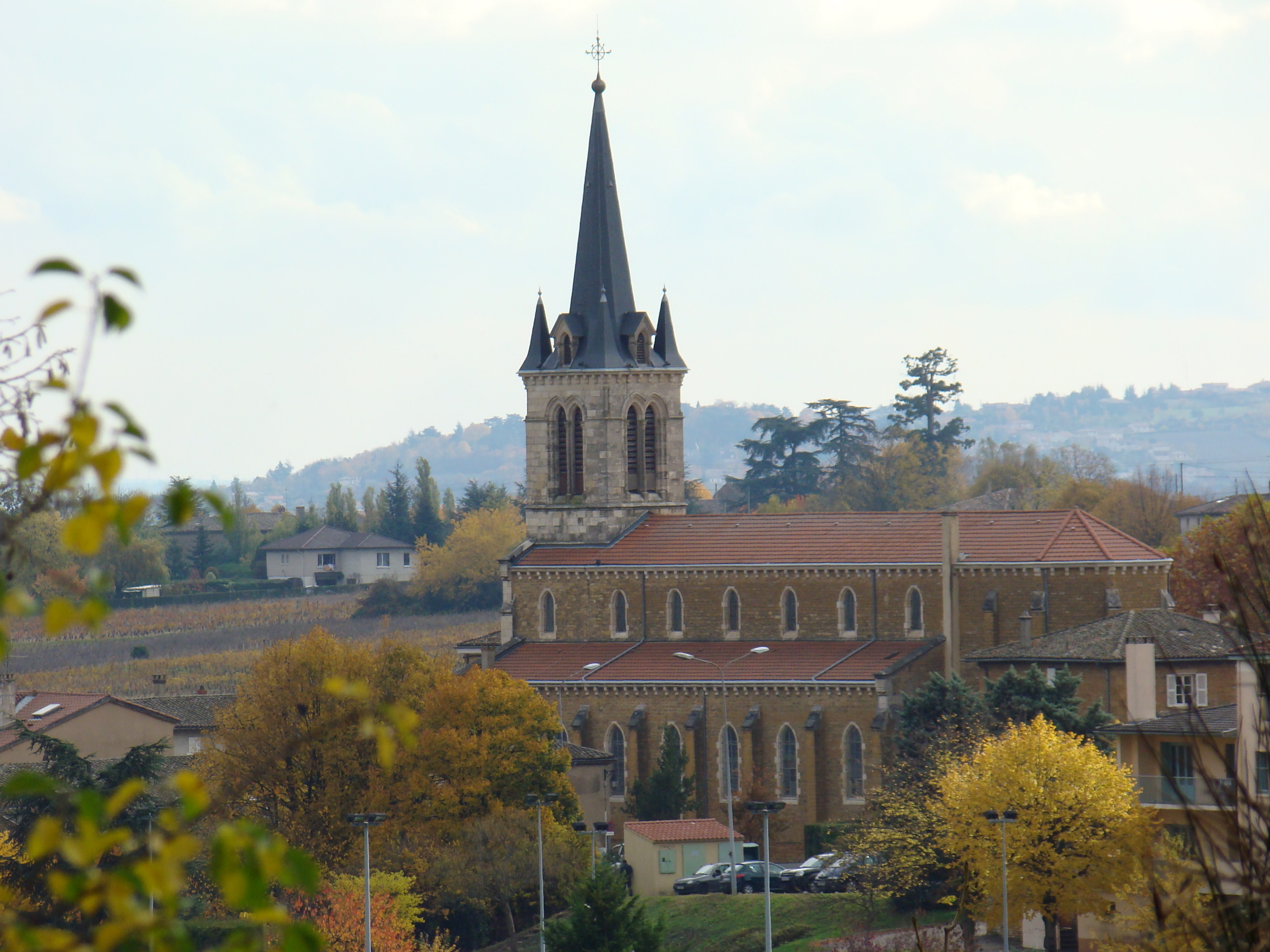 église de Denicé vue des collines environnantes